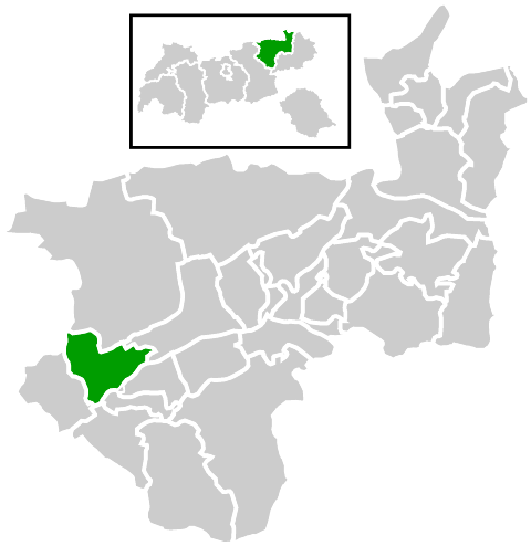 Lage der Gemeinde innerhalb des Bezirks Kufstein